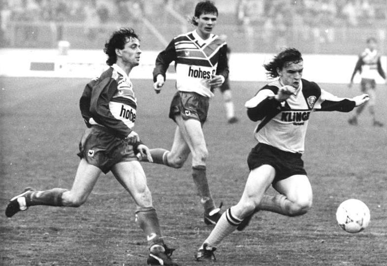 BER-7-27.10.90-zi-Dresden Oberliga- Mit sensationellen 7:0 Toren trennten sich am 9. Spieltag die Fußballer des 1. FC Dynamo Dresden und des FC Sachsen Leipzig. Zu den Torschützen zählte auch Heiko Scholz (r.), der sich hier gegen die Leipziger Holm Pinder und Jens Härtel durchsetzt. ADN-Matthias Hiekel